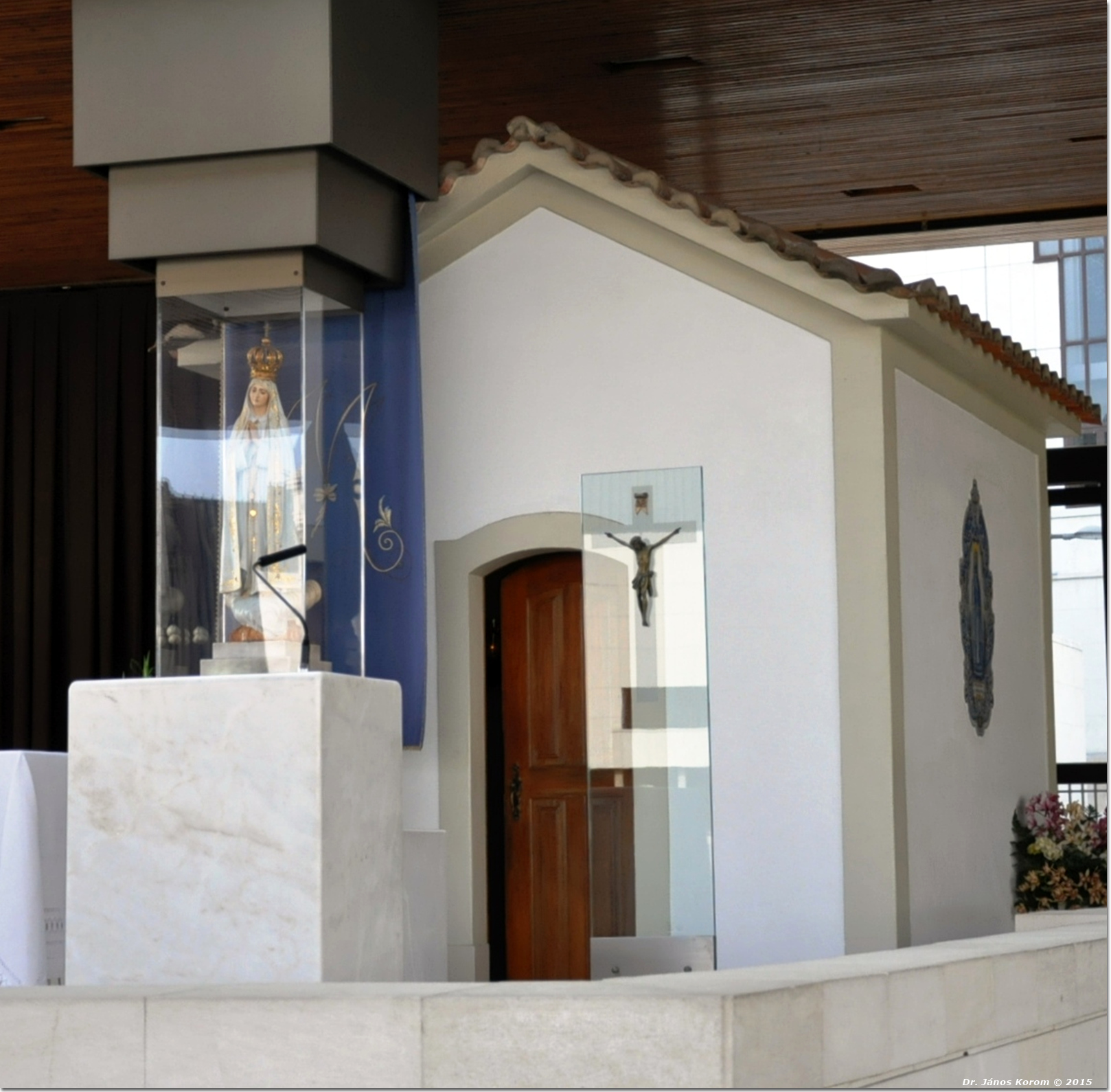 Die Statue Unserer lieben Frau - Das an der Erscheinungsstelle errichtete Kapellchen